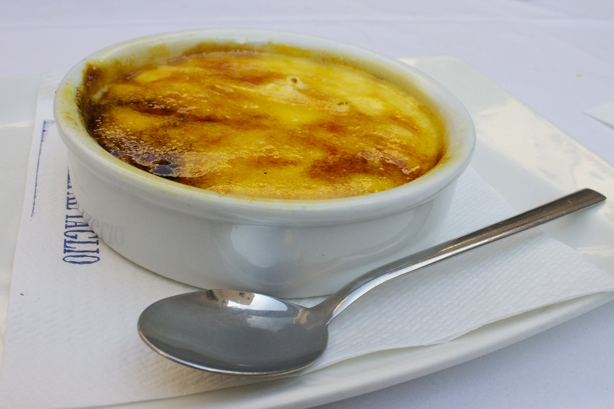 Una crema catalana en la Plaza de Santa Maria del Mar, Barcelona.